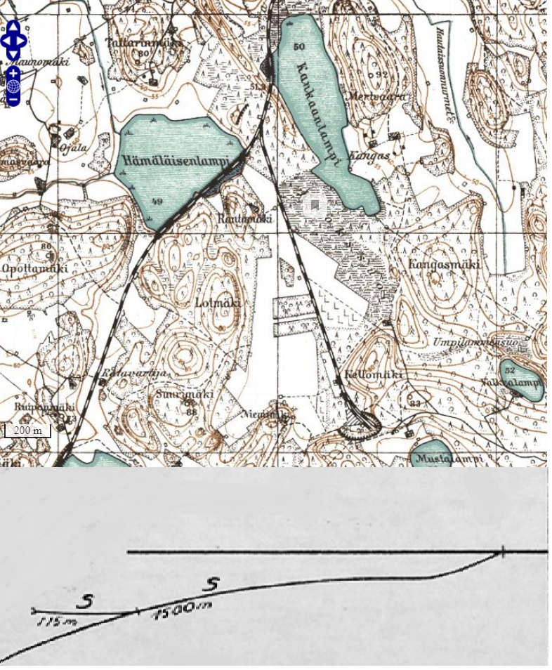 Схема путевого поста Мустола.